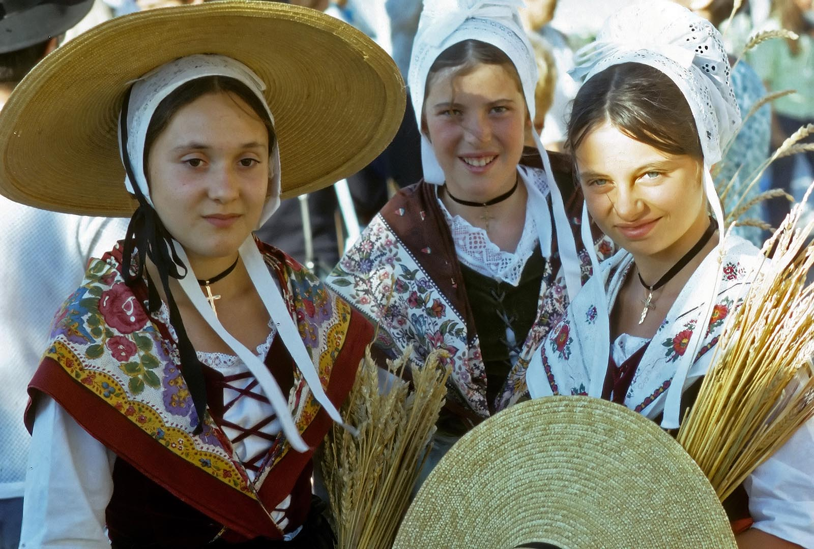 Comtadines de Vaison-la-Romaine